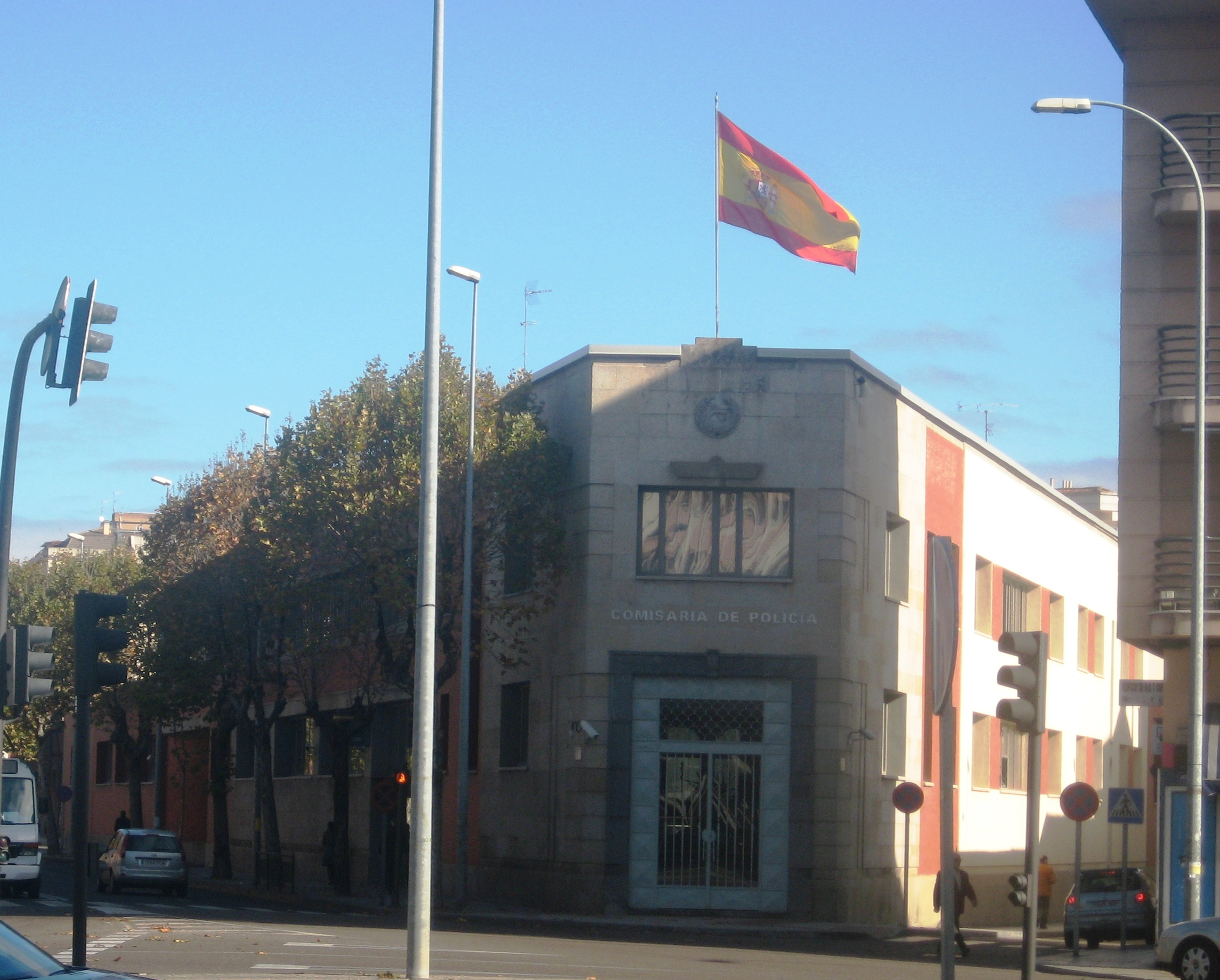 Comisaría de Policía Nacional de Zamora